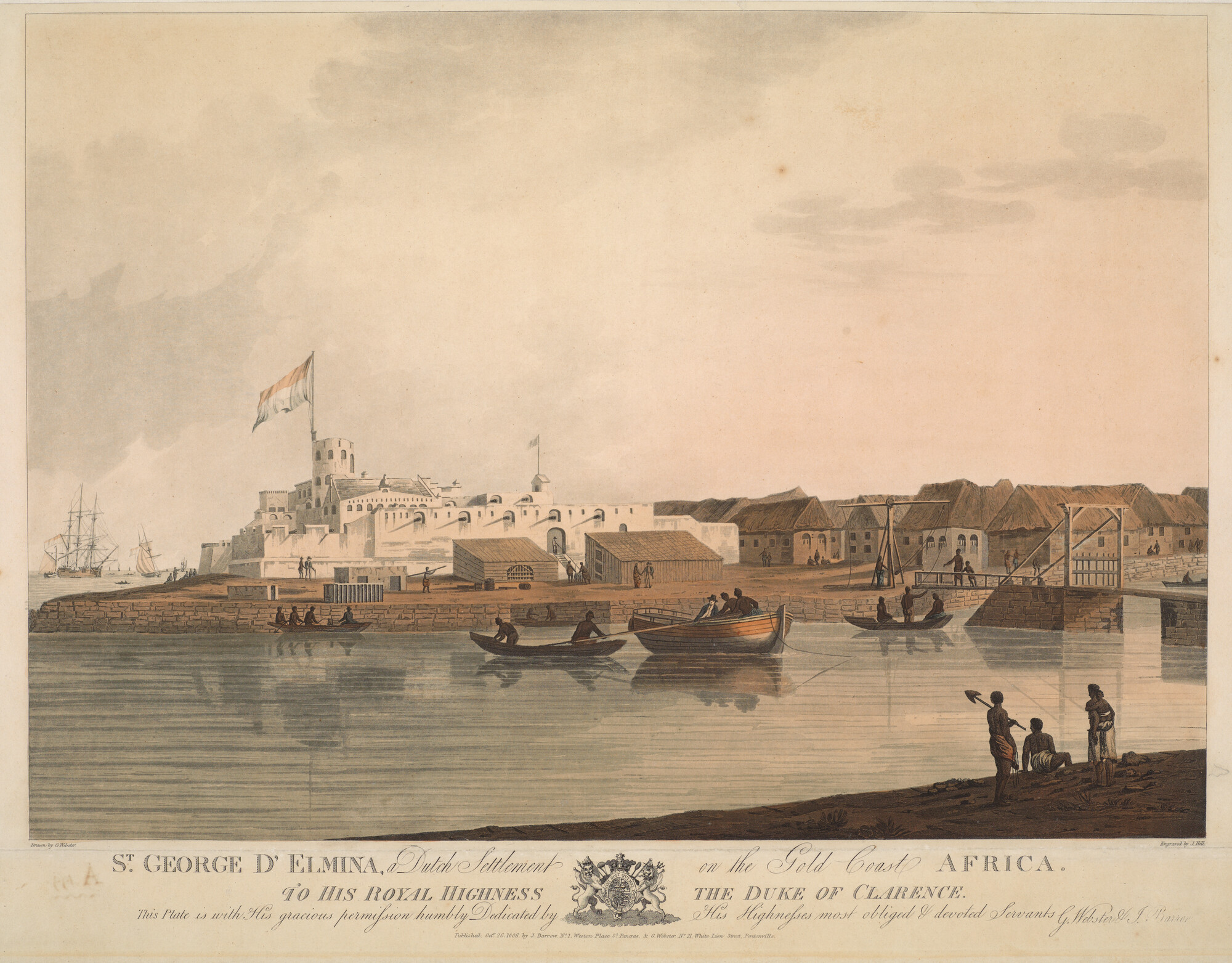 De nederzetting Elmina aan de Goudkust.